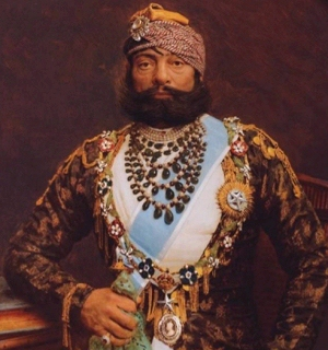 Jaswant Singh II